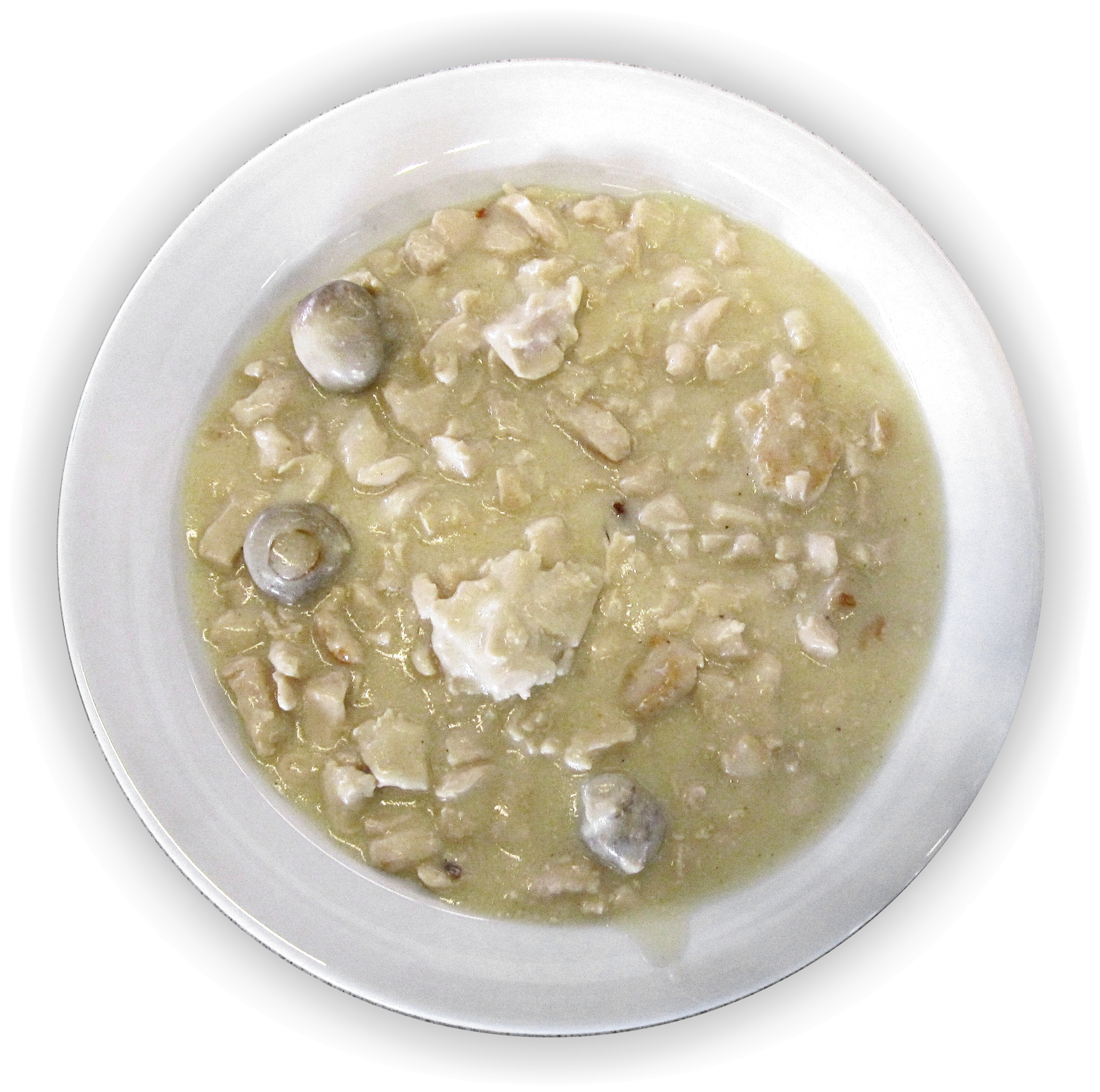 Hühnerfrikassee – Frikassee mit Huhn, Champigons und Blumenkohl